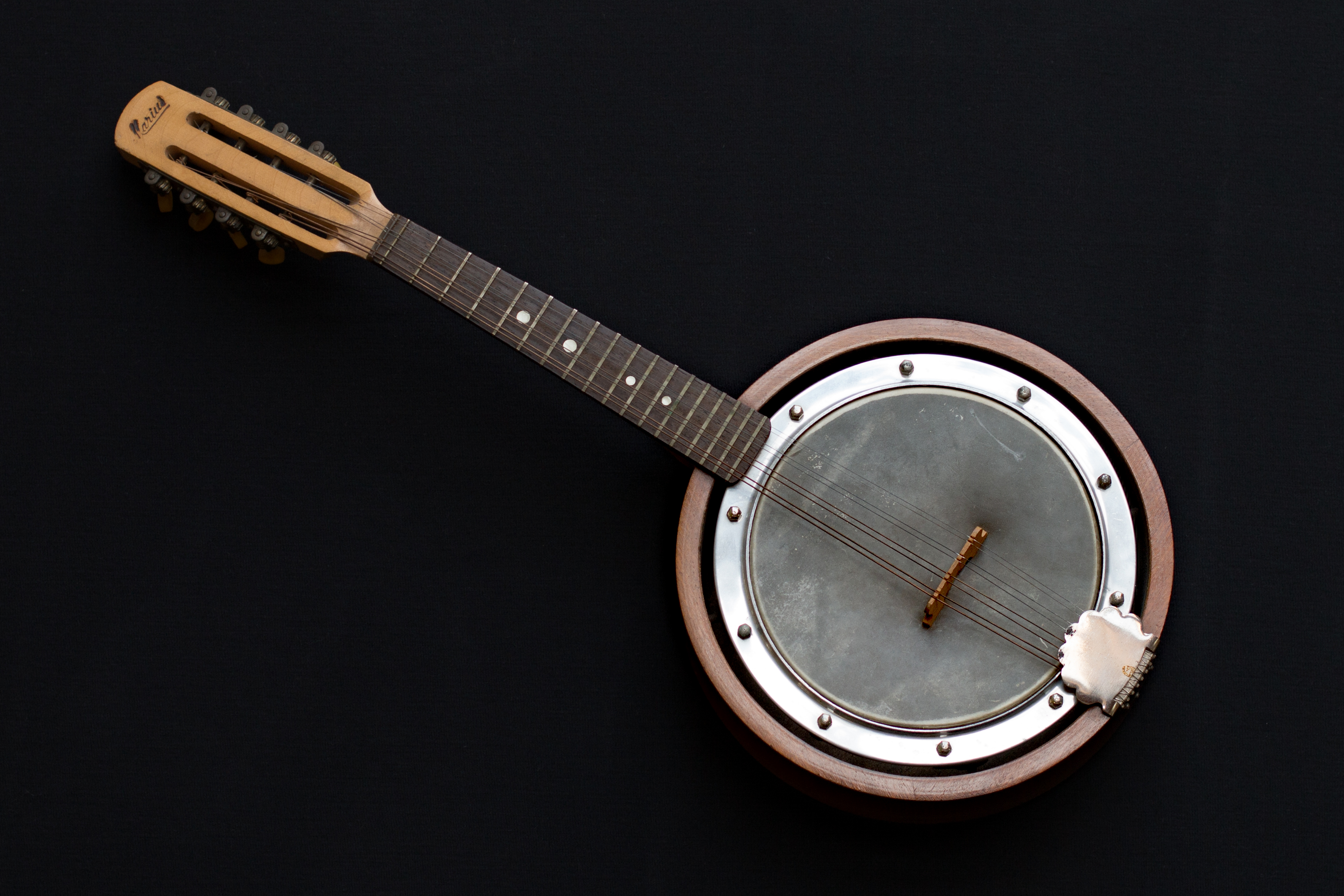 mandolinebanjo